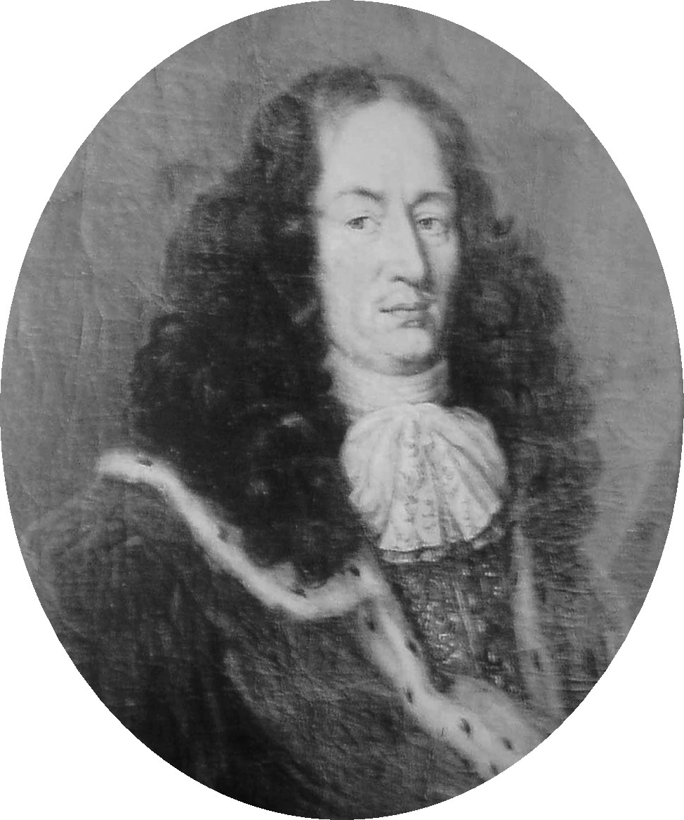 Knut Kurck (1622-1690)